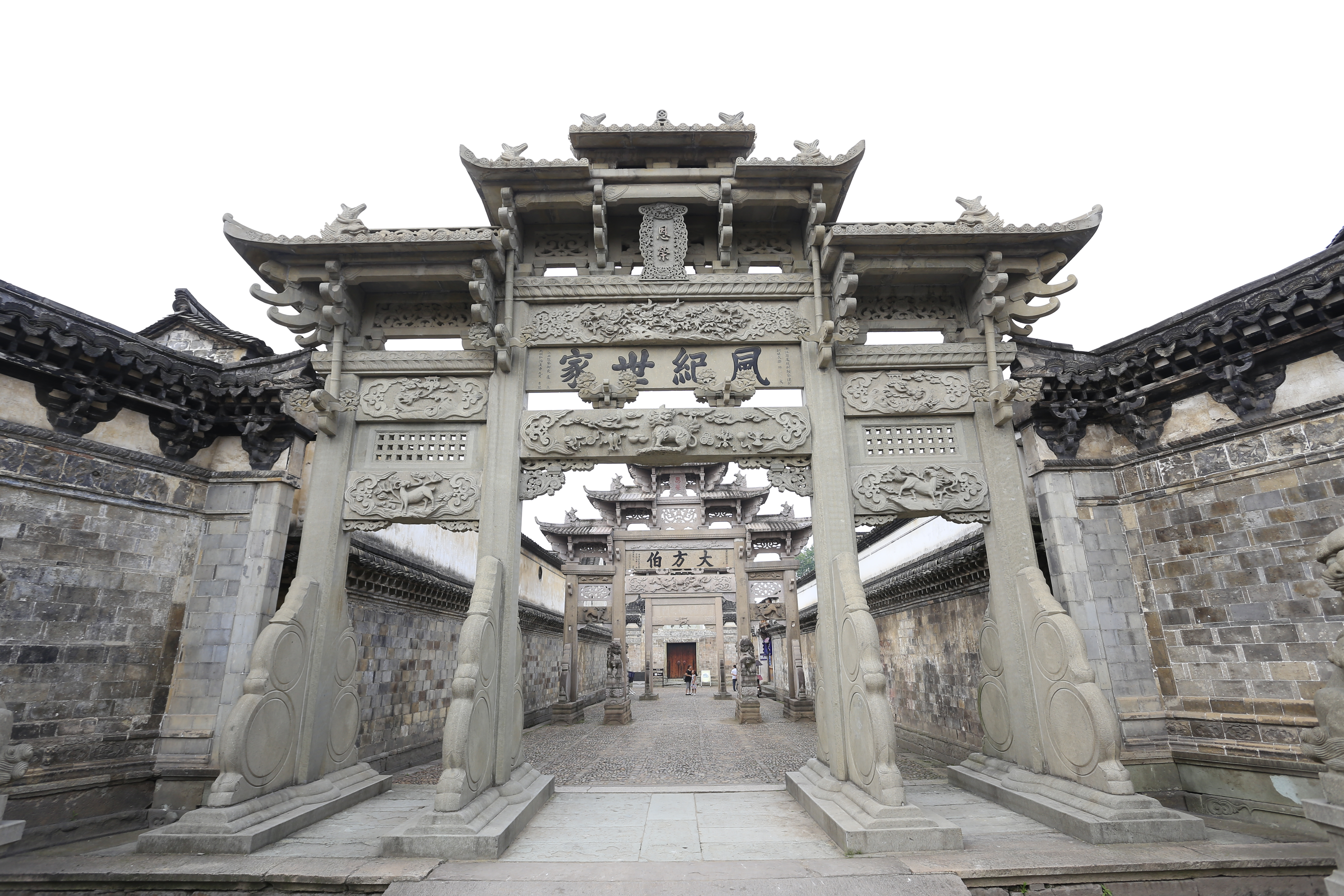 东阳卢宅 入口的石牌坊